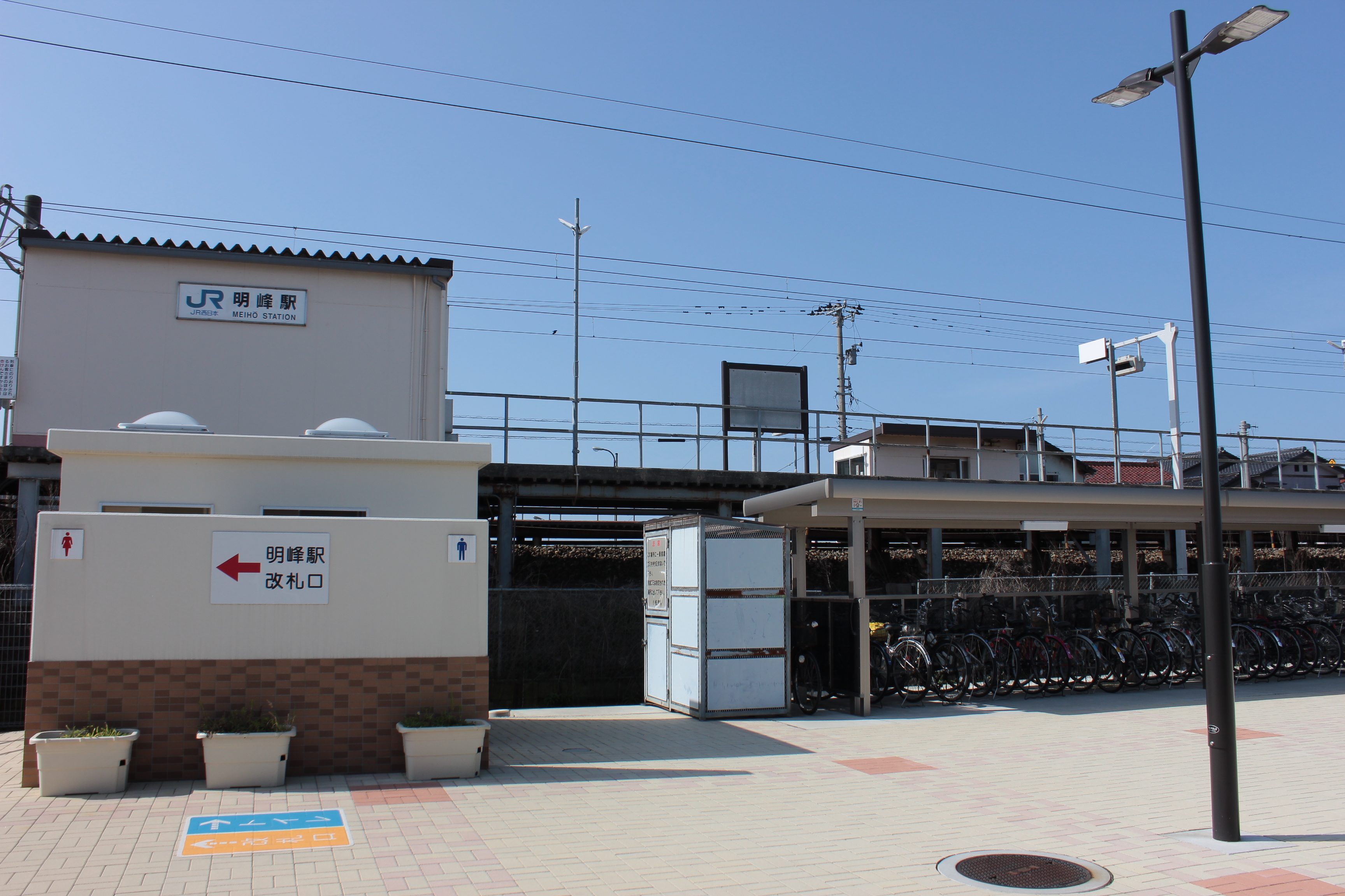 明峰駅（石川県小松市） Canon EOS Kiss X5